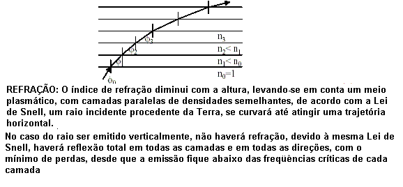 O efeito combinado de refração através de inúmeras camadas de ionização, a partir de determinado ângulo de incidência gera a reflexão de ondas de rádio.